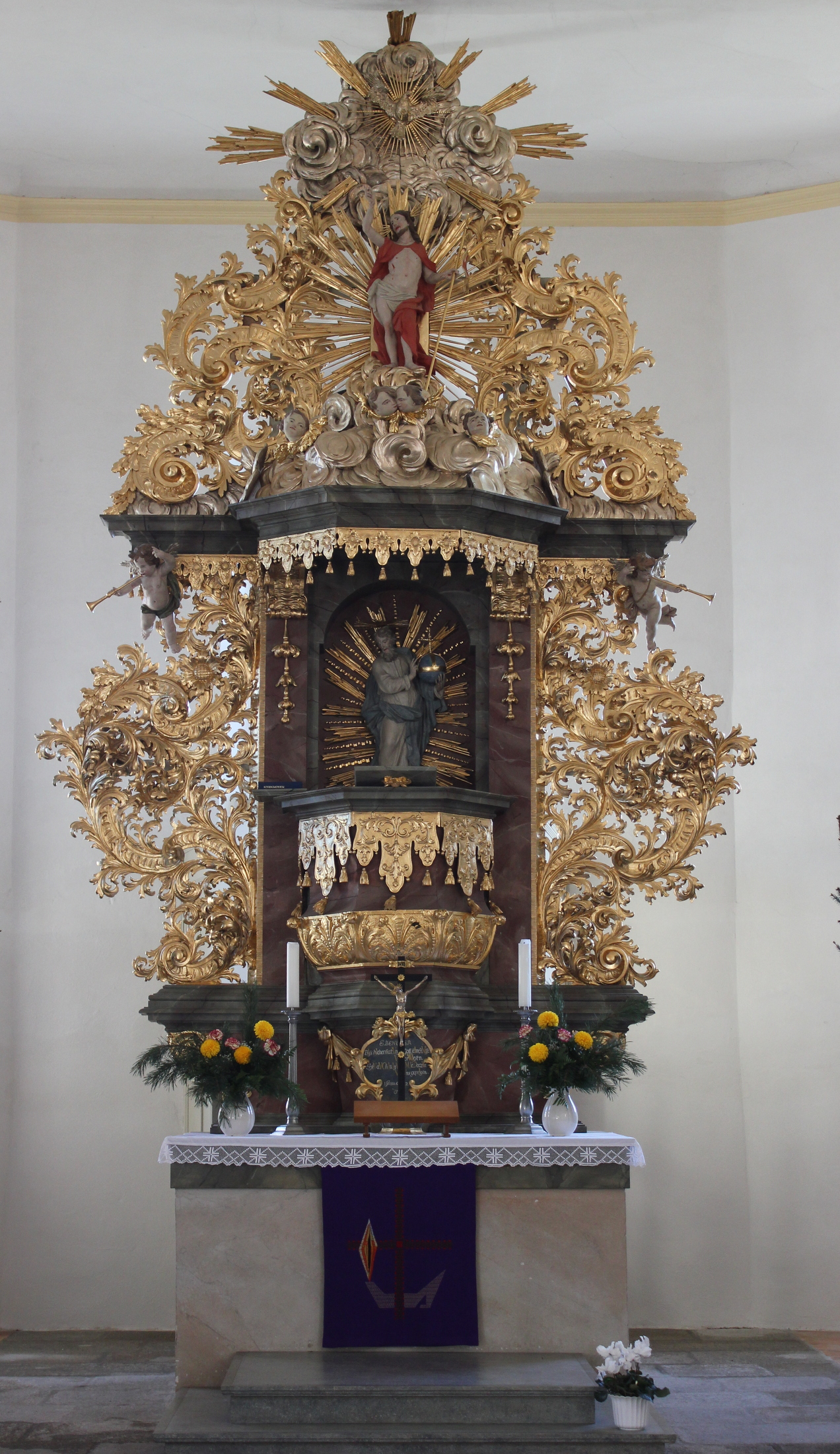 Hornjoserbsce: Wołtar Malešanskeje ewangelskeje cyrkwje.